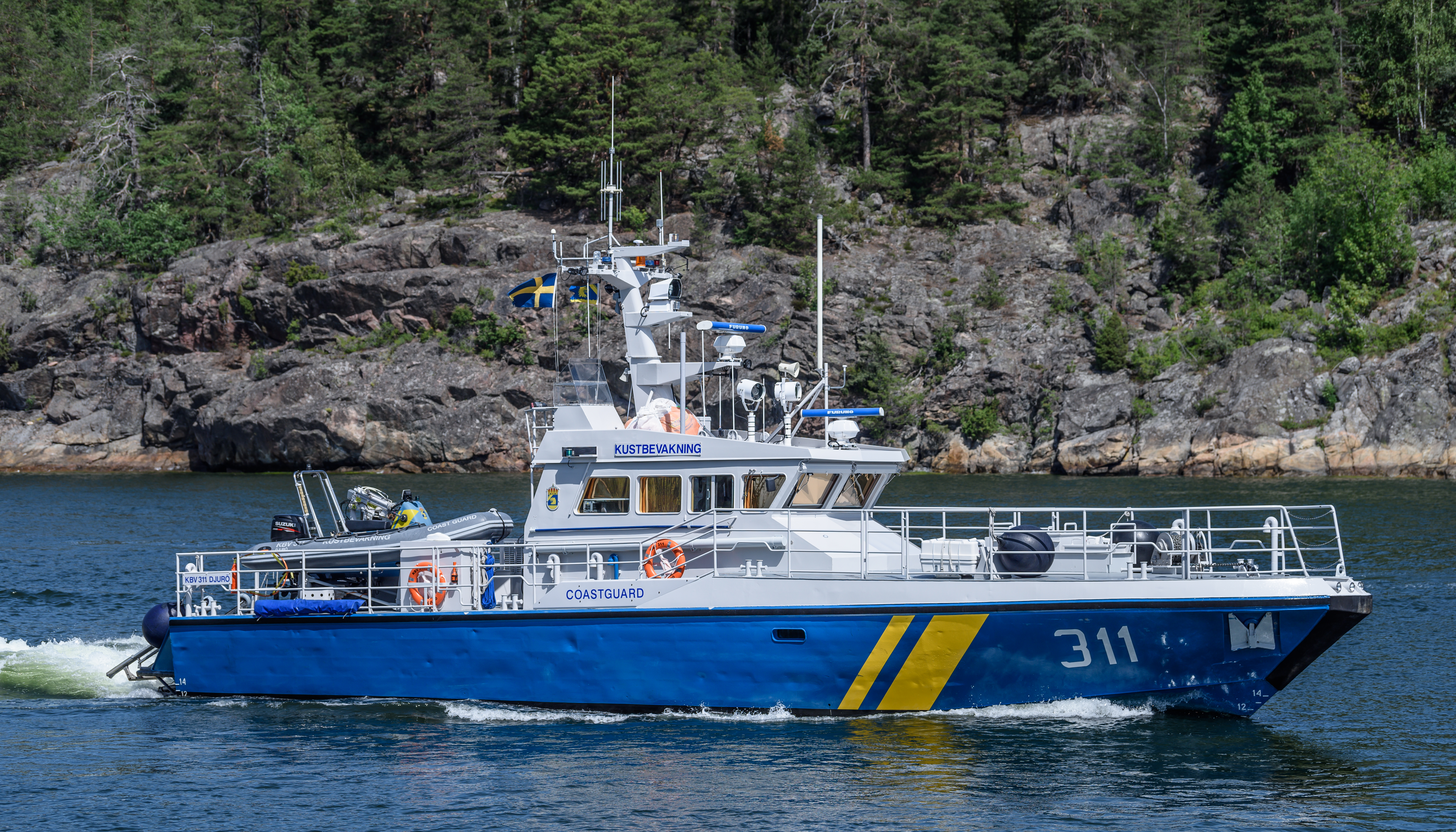 Boats, Vaxholm, Stockholm, Sweden, June 2018